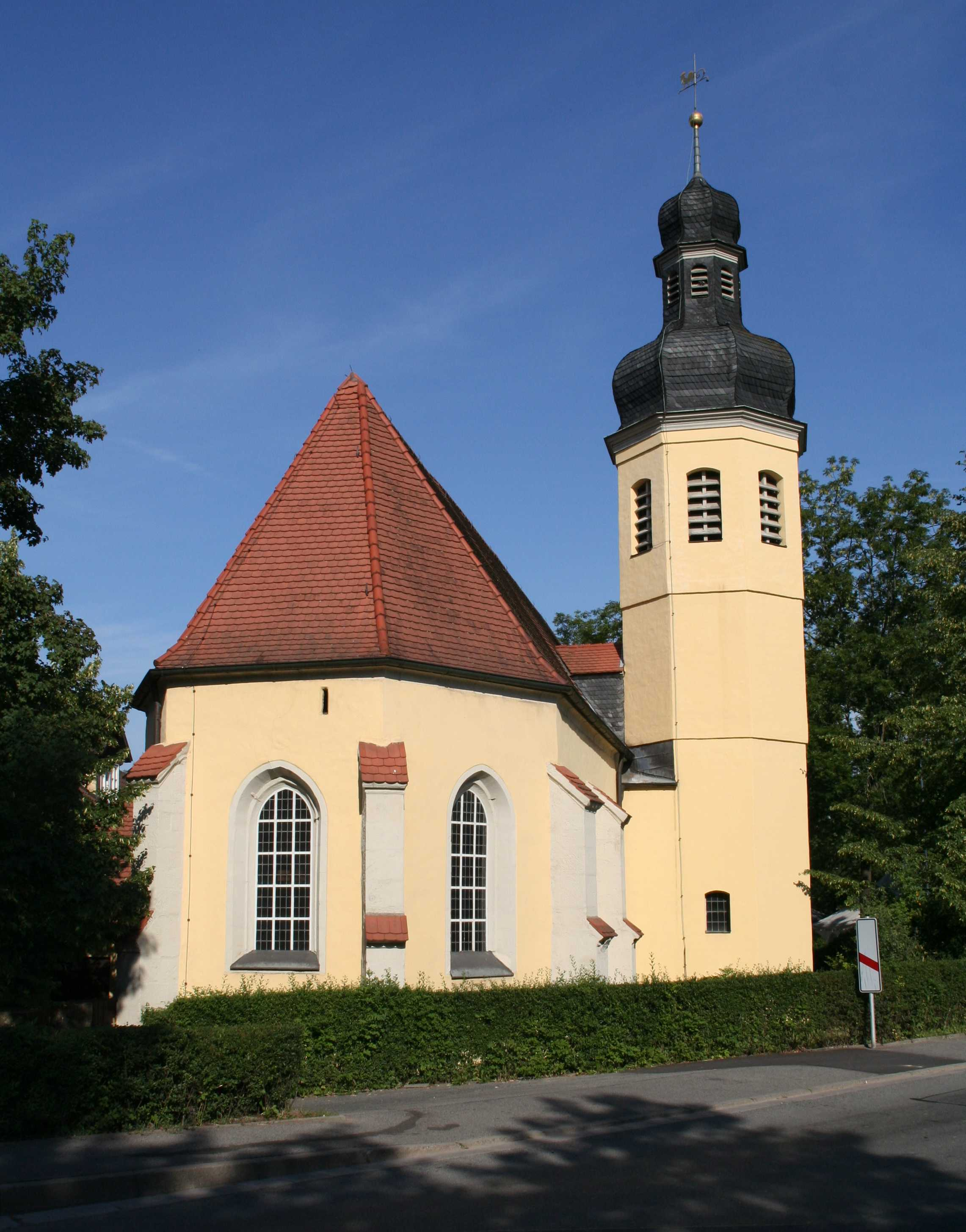 ev. Kirche Oeslau entalevangelische St.-Johannis-Kirche in Oeslau OT Rödentals, Landkreis Coburg